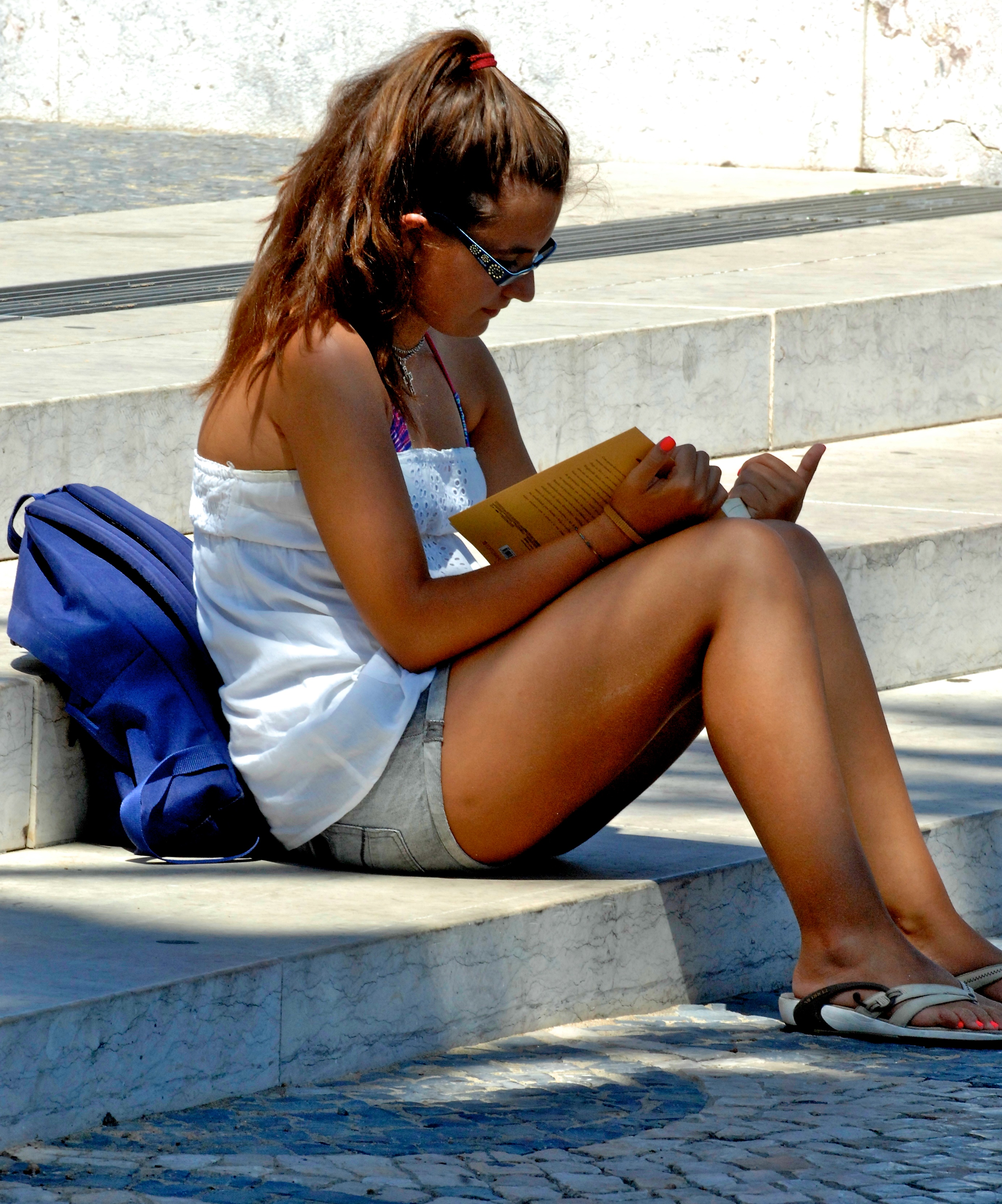 Cascais, Portugal